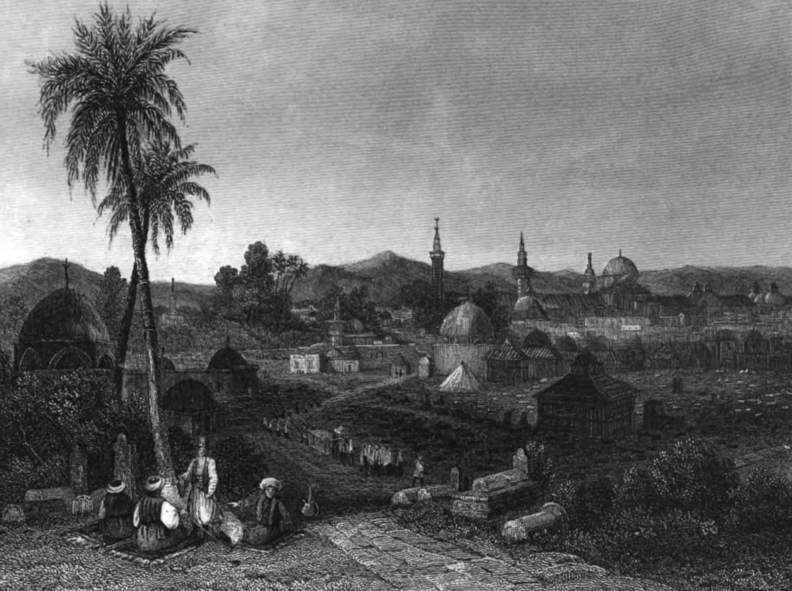 Damascus